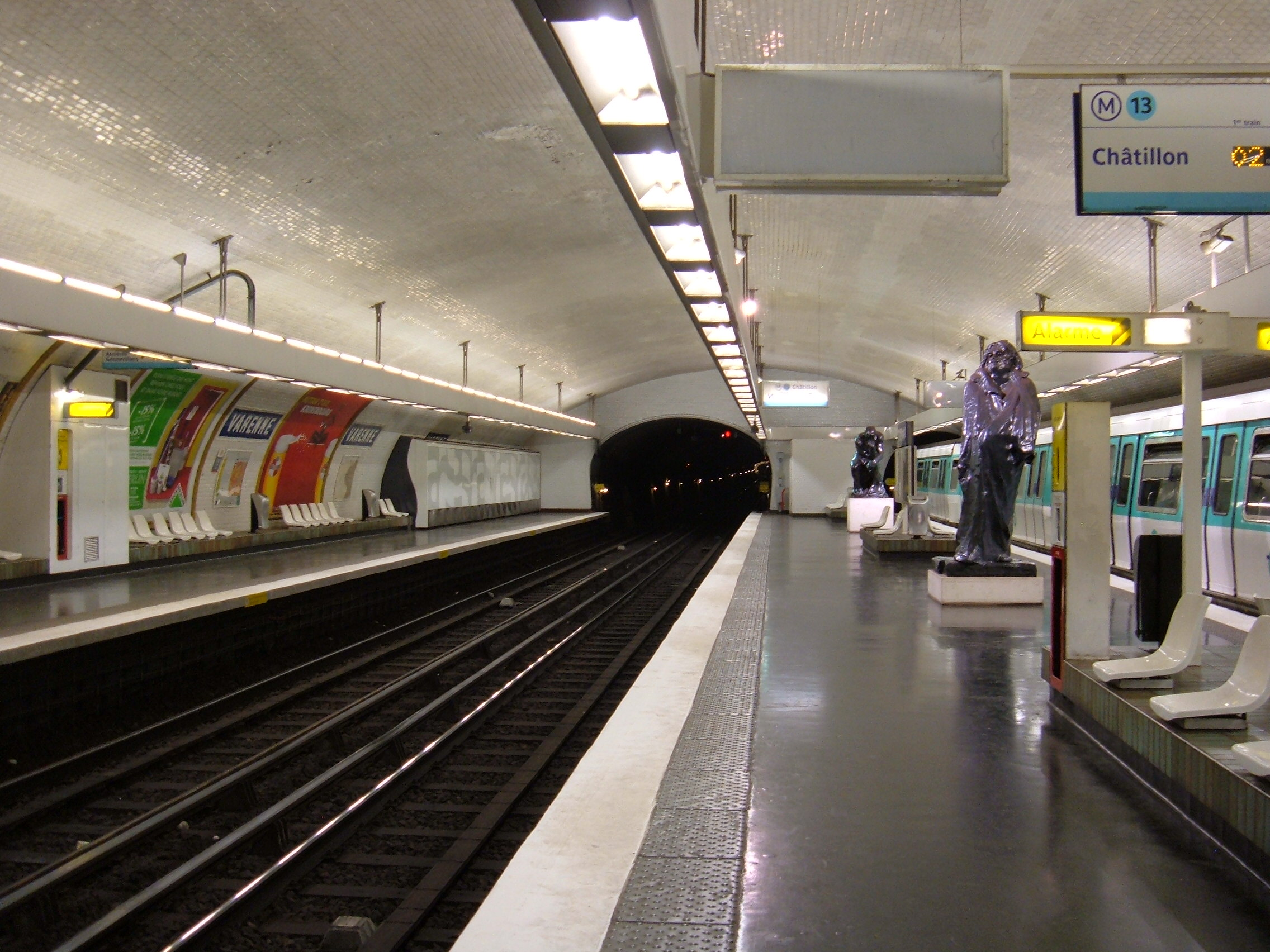 Varenne Metro station in Paris.